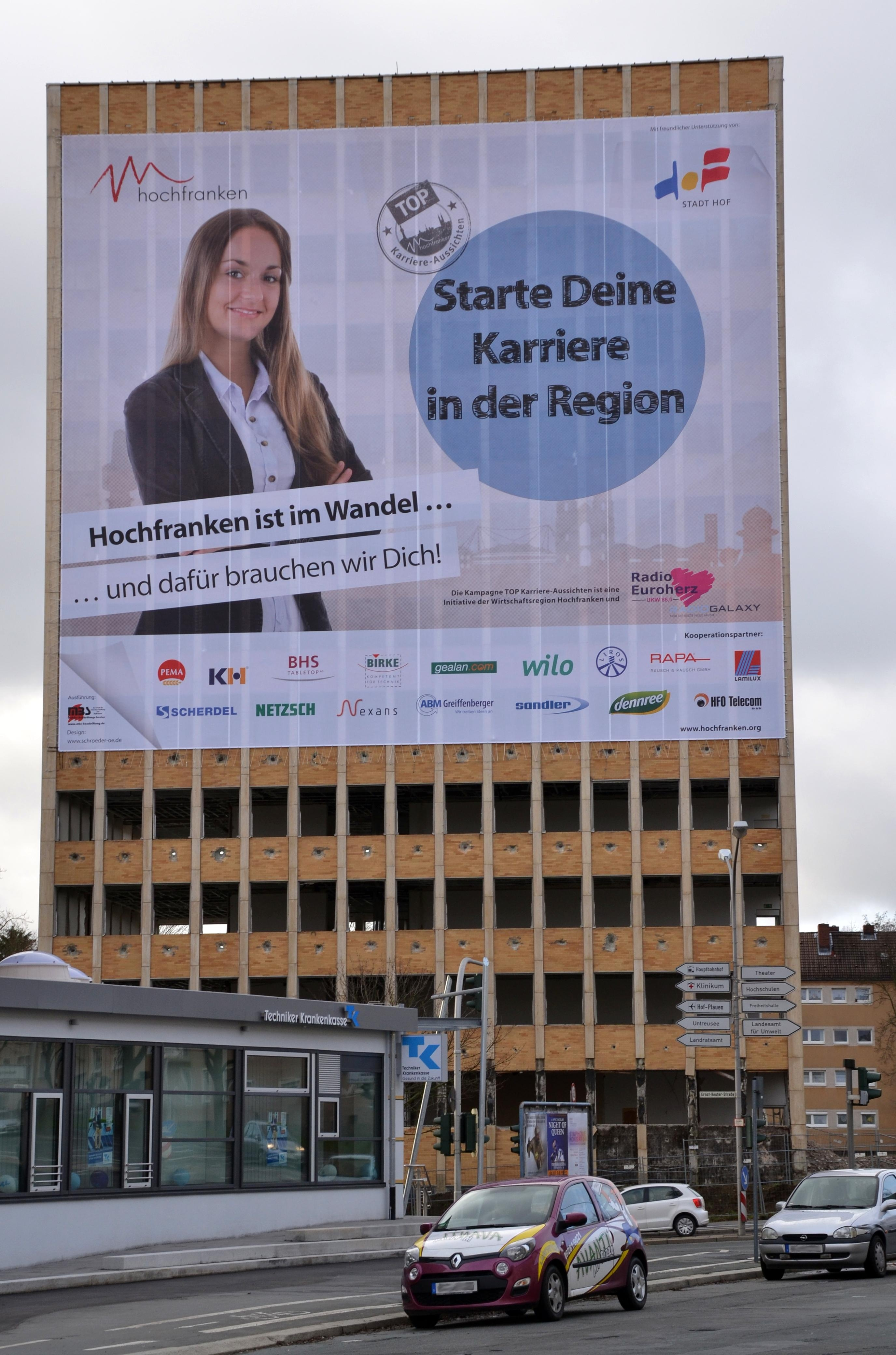 Das Justizgebäude in Hof während der mehrmonatigen Pause der Abrissarbeiten. Ein Werbeplakat verschönt den Anblick etwas..